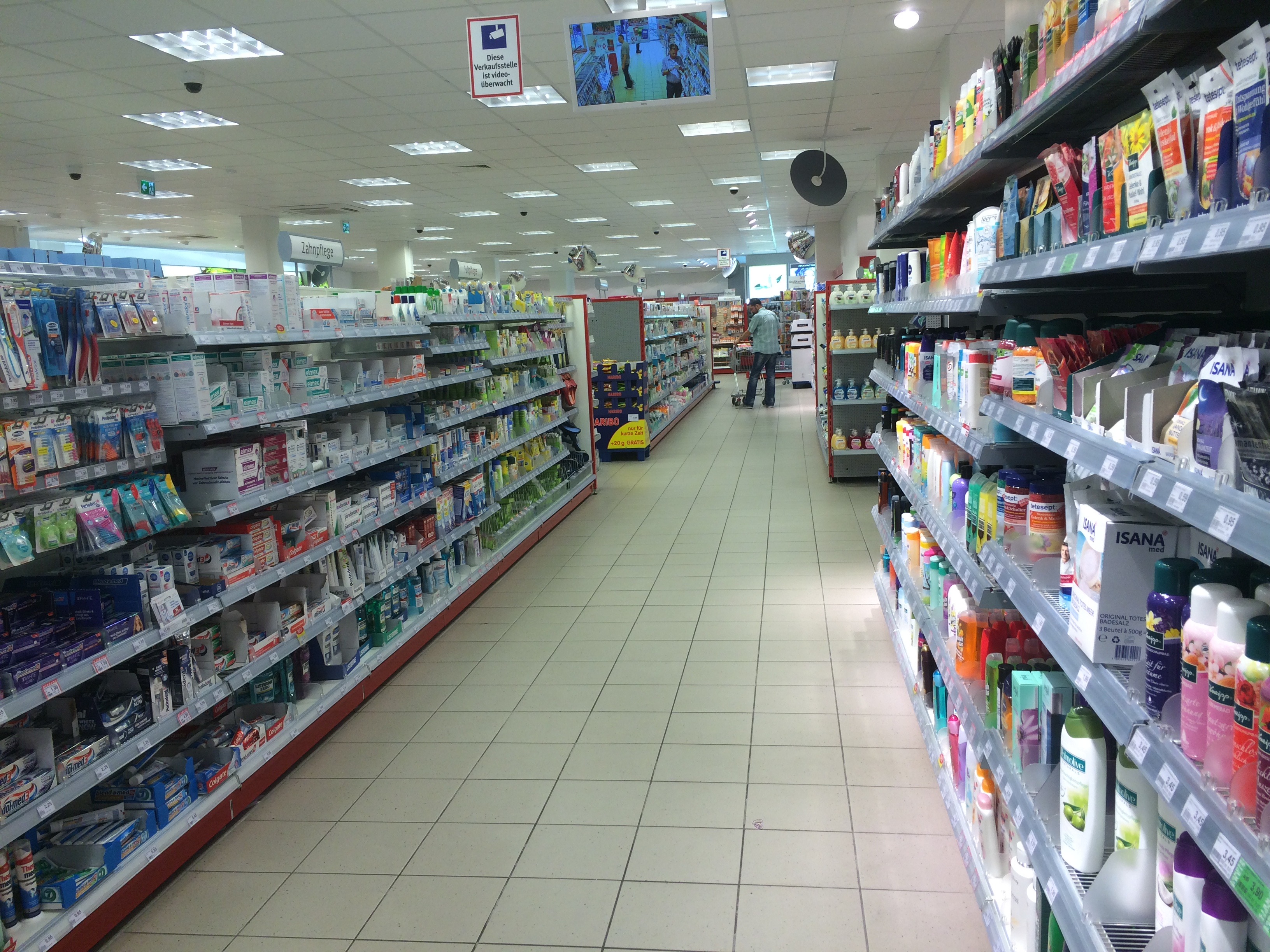 Rossmann Innen